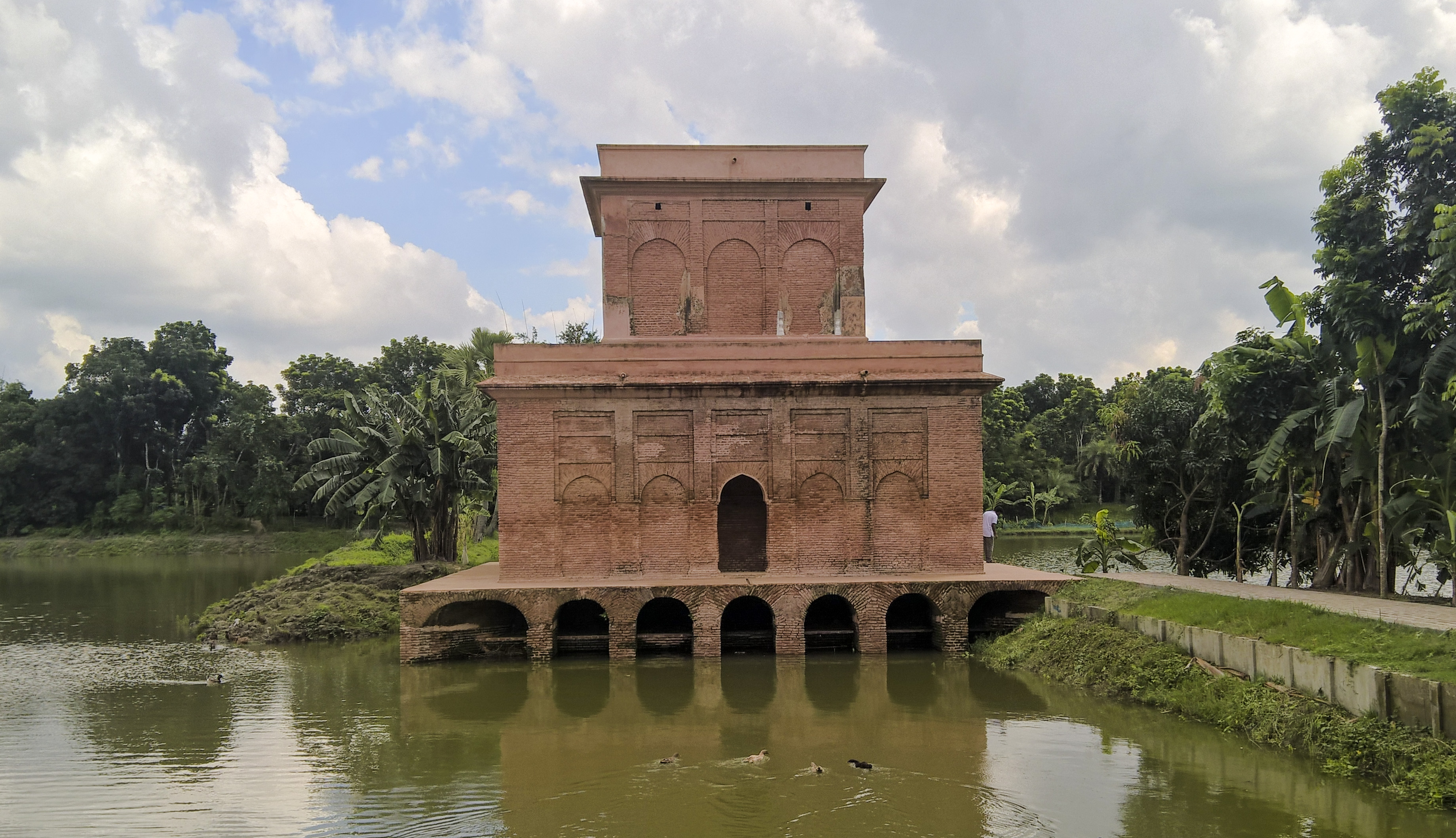 হাওয়া খানা পুঠিয়া রাজশাহী অঞ্চলের অন্যতম একটি প্রত্নস্থান। এটি পুঠিয়া বাজার থেকে ৩ কিলোমিটার দক্ষিন পশ্চিমে অবস্থিত। হাওয়াখানাটি মুলত দ্বিতল ভবন।